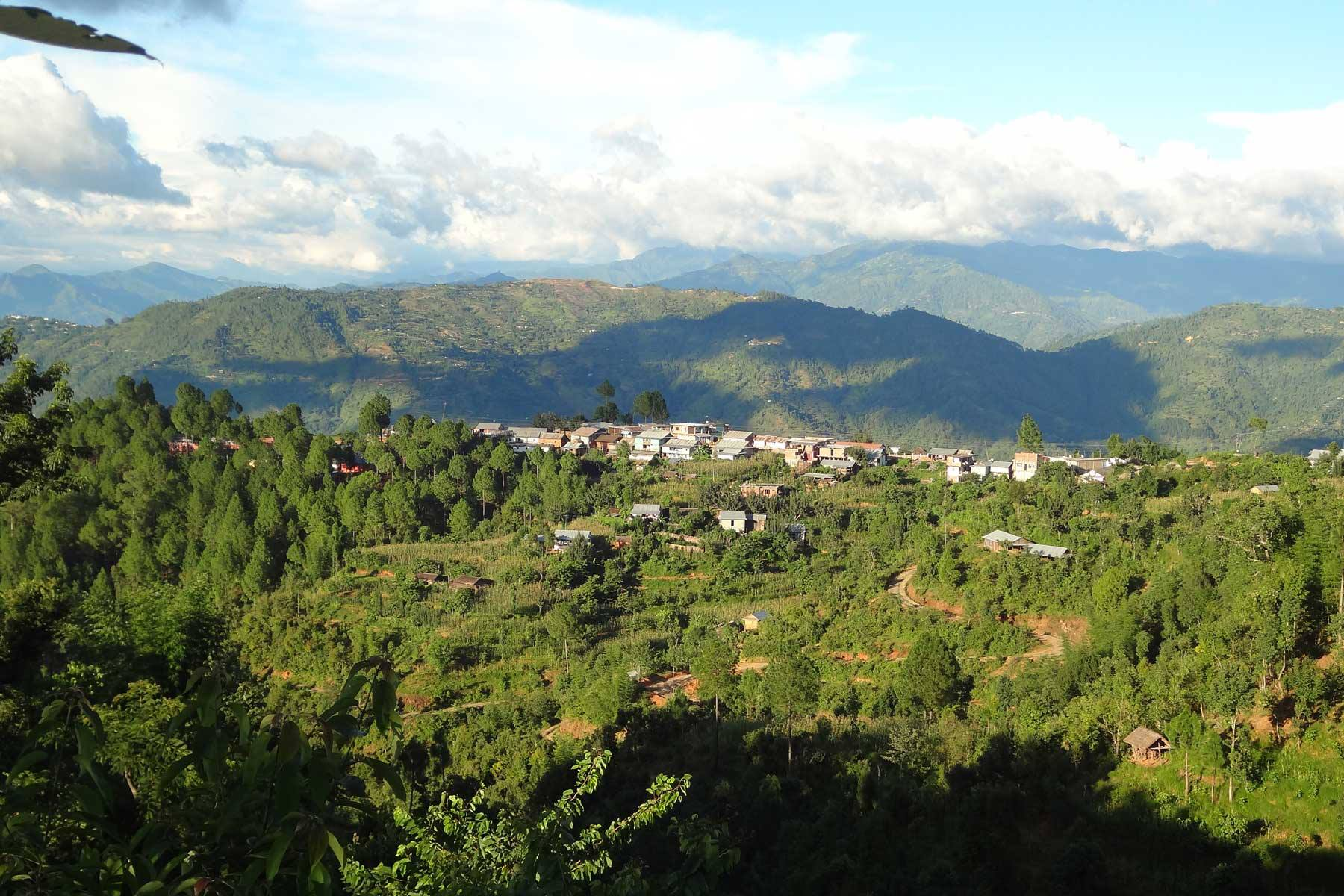 नेपाली: केहि परबाट मौनाबुधुकको सुन्दर दृश्य ।